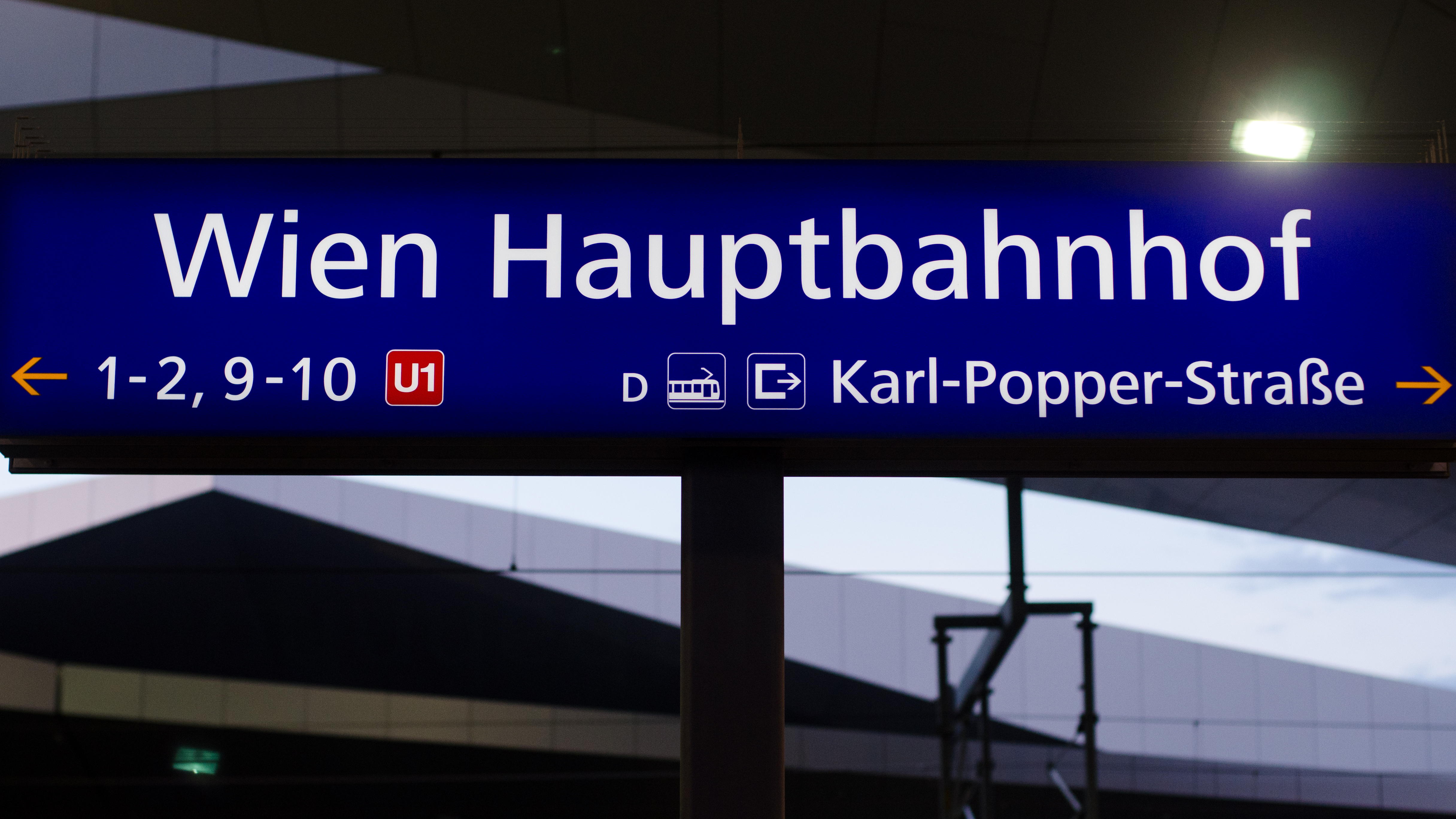 DSC_3860_LR